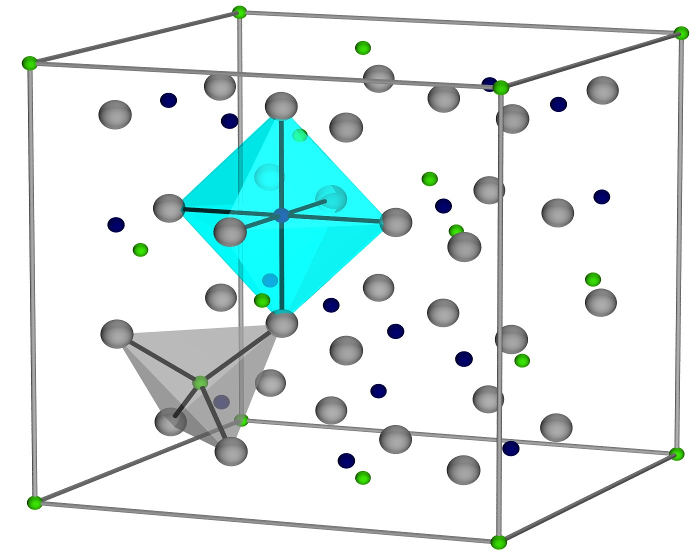 Einheitszelle von Magnetit, Sauerstoff (grau), divalentes Eisen (grün), trivalentes Eisen (blau), Eisenion in Oktaederlücke (hellblauer Oktaeder), Eisenion in Tetraederlücke (grauer Tetraeder).